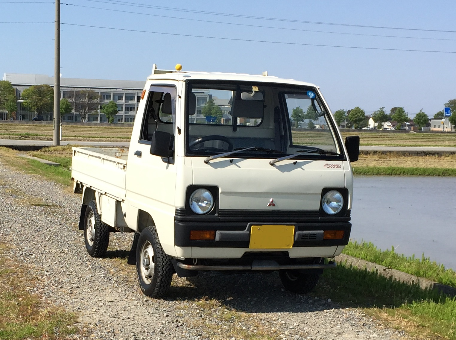 U19Tトラック